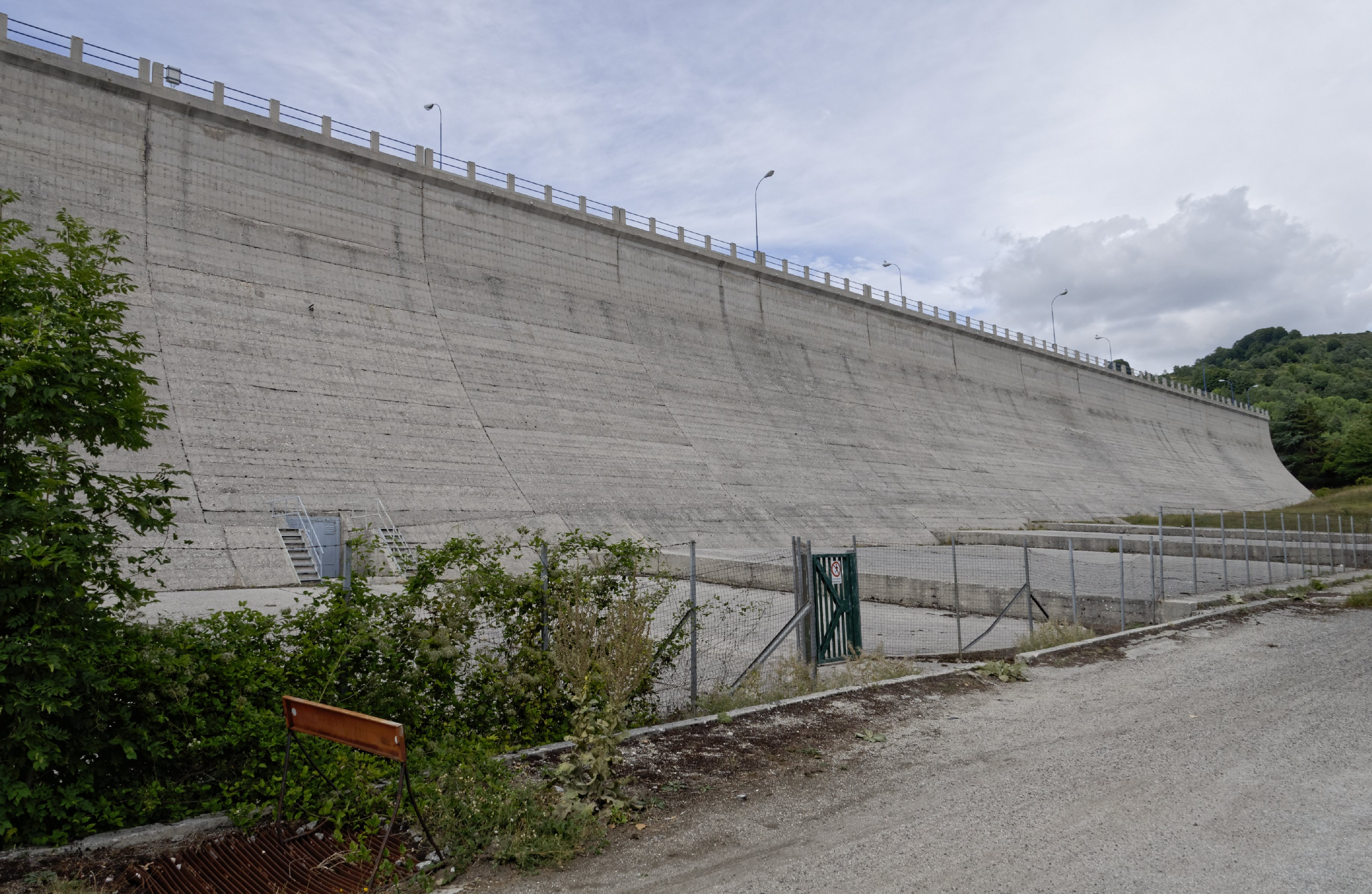 Lago di Campotosto 2015 Dieses Foto entstand in Zusammenarbeit mit Stadtbesichtigungen.de Die Seiten Stadtbesichtigungen.de, der dazugehörige Reise Blog sowie die Facebookseite: Stadtbesichtigungen Rom dürfen dieses Bild für Ihre Veröffentlichungen ohne den Hinweis auf Wikipedia, Commons bzw der Lizenz verwenden. Die Verantwortlichen habe von mir (Ra Boe) die Originaldaten zur freien Verfügung übermittelt bekommen.